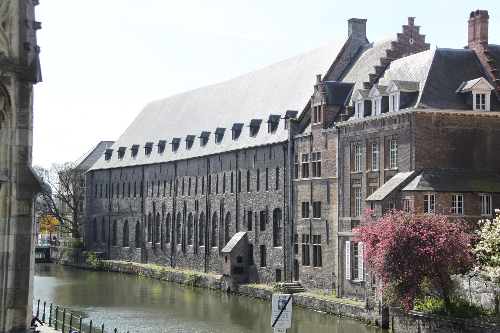 Ghent, Belgium on 2011-04-10